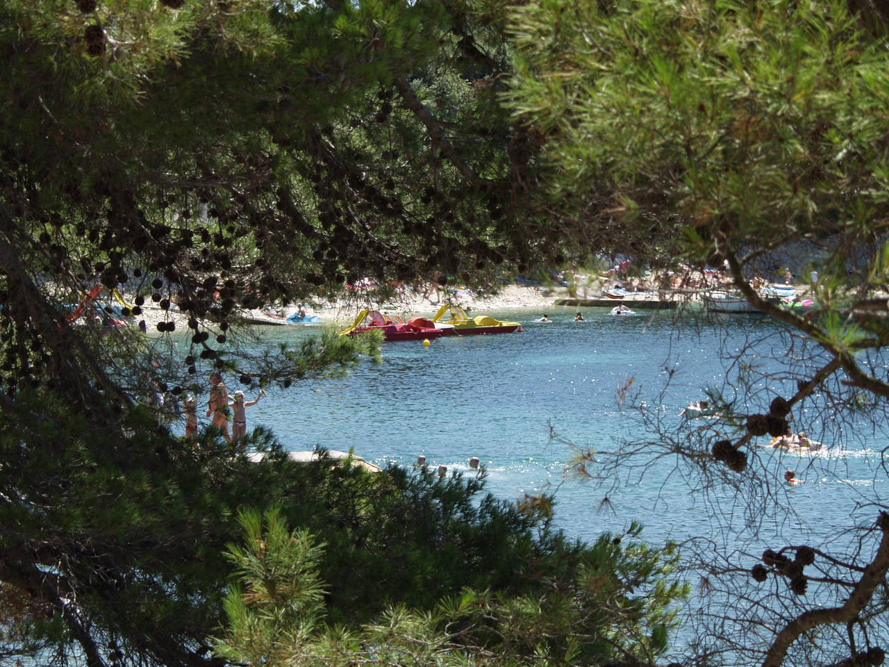 Bucht Banjole